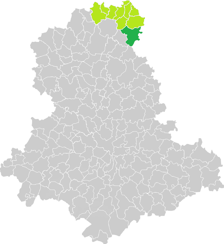 Carte de situation de la commune d'Arnac-la-Poste (en vert foncé) dans le votre Canton (en vert clair) sur une carte des communes de la Haute-Vienne